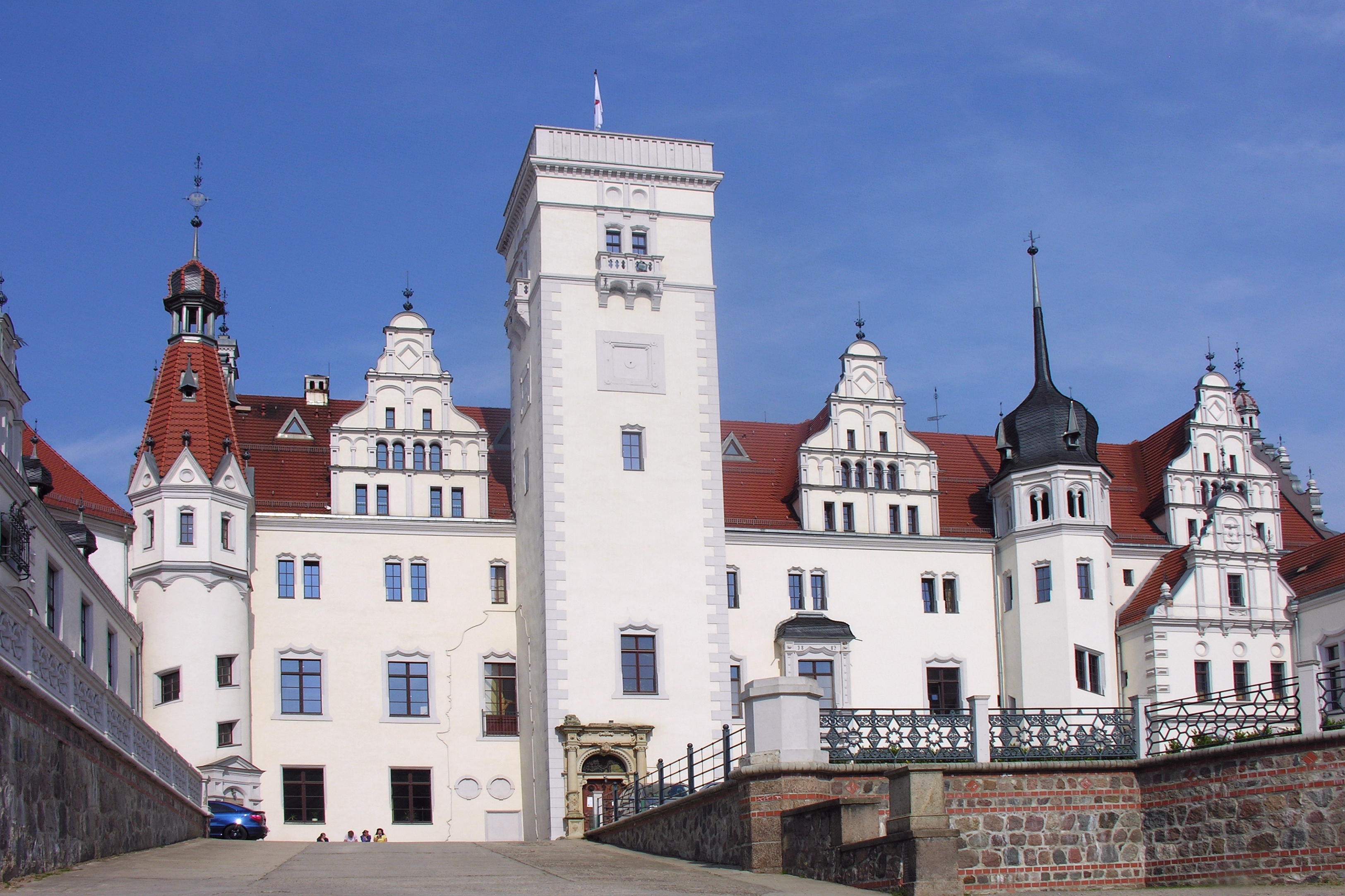 Parkseite von Schloss Boitzenburg mit auffahrt Ansicht Südosten. Erstmals Baulichkeit als Burg in 1275. Uckermark, Brandenburg. Foto Wolfgang Pehlemann DSCN8535